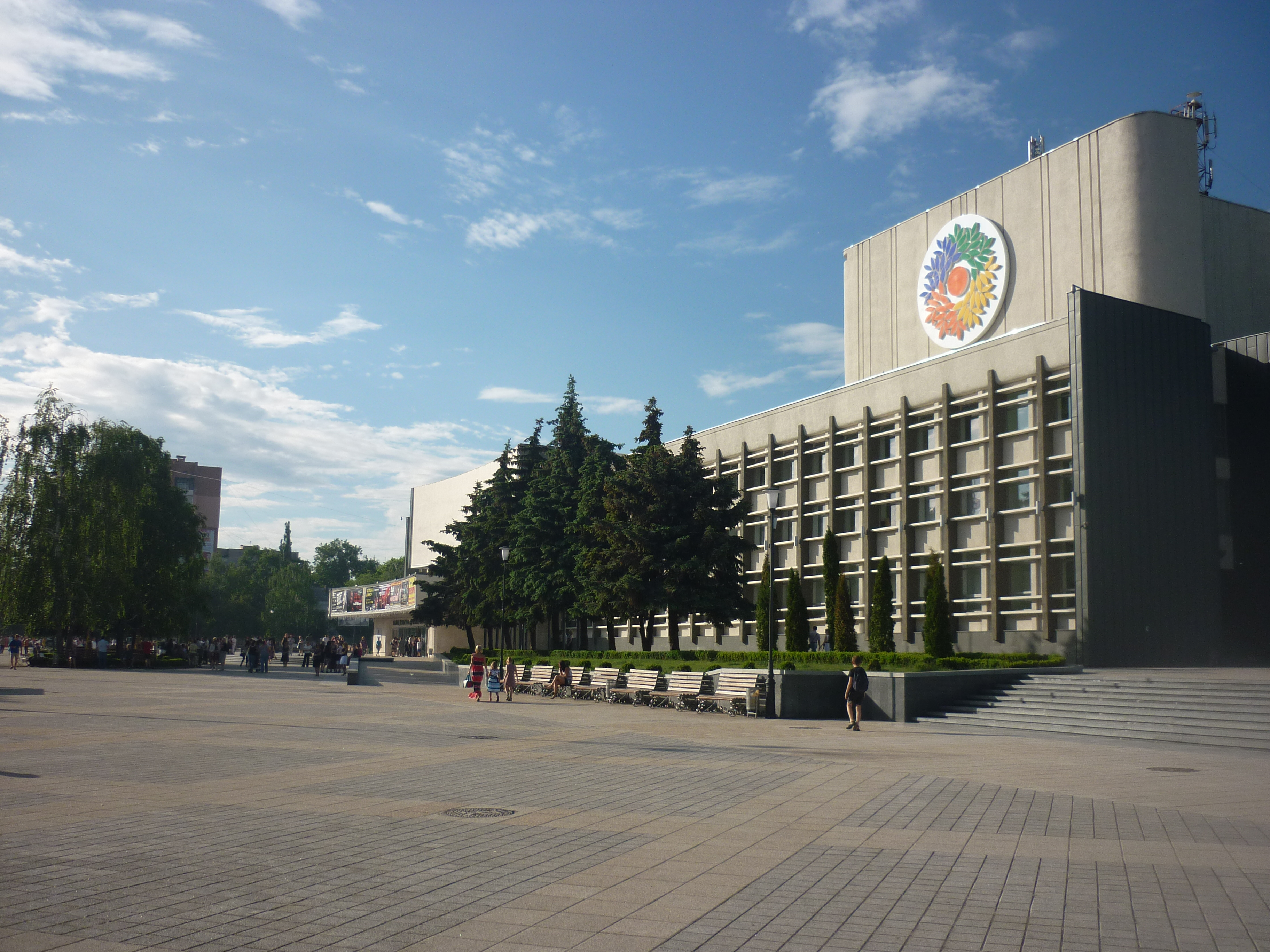 Палац культури "Дружба народів" у Черкасах. Зовнішній вигляд